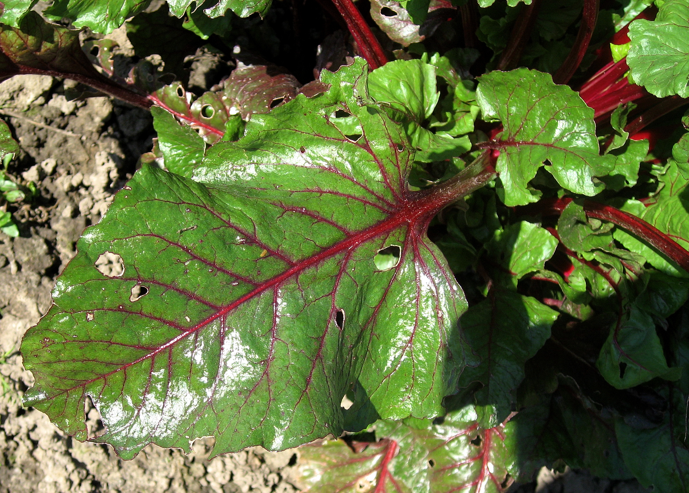 Dortmund, Rombergpark, Heilkräutergarten, Rote Rübe Beta vulgaris var. conditiva Alef., Med. Eigenschaften: Antiseptisch, appetitanregend, fördert die Gallensekretion, mineralsalzzuführend, tonisch Anwendung: innerlich Anwendungsgebiete: Anämie, Asthenie, Epidemie, Leber, Mineralsalzmangel